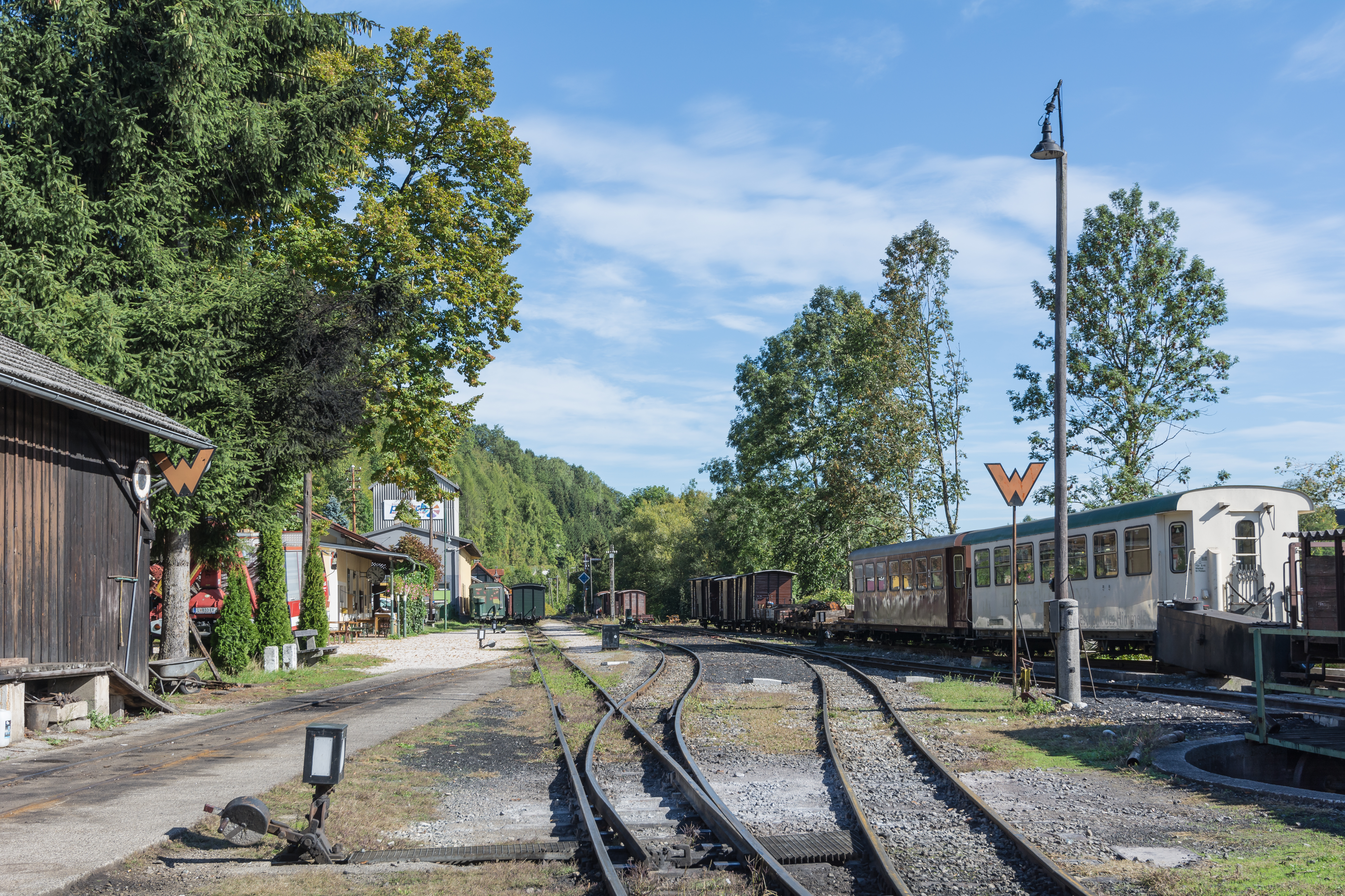 Der Bahnhof Grünburg der Steyrtalbahn befindet sich auf dem Gemeindegebiet von Waldneukirchen.